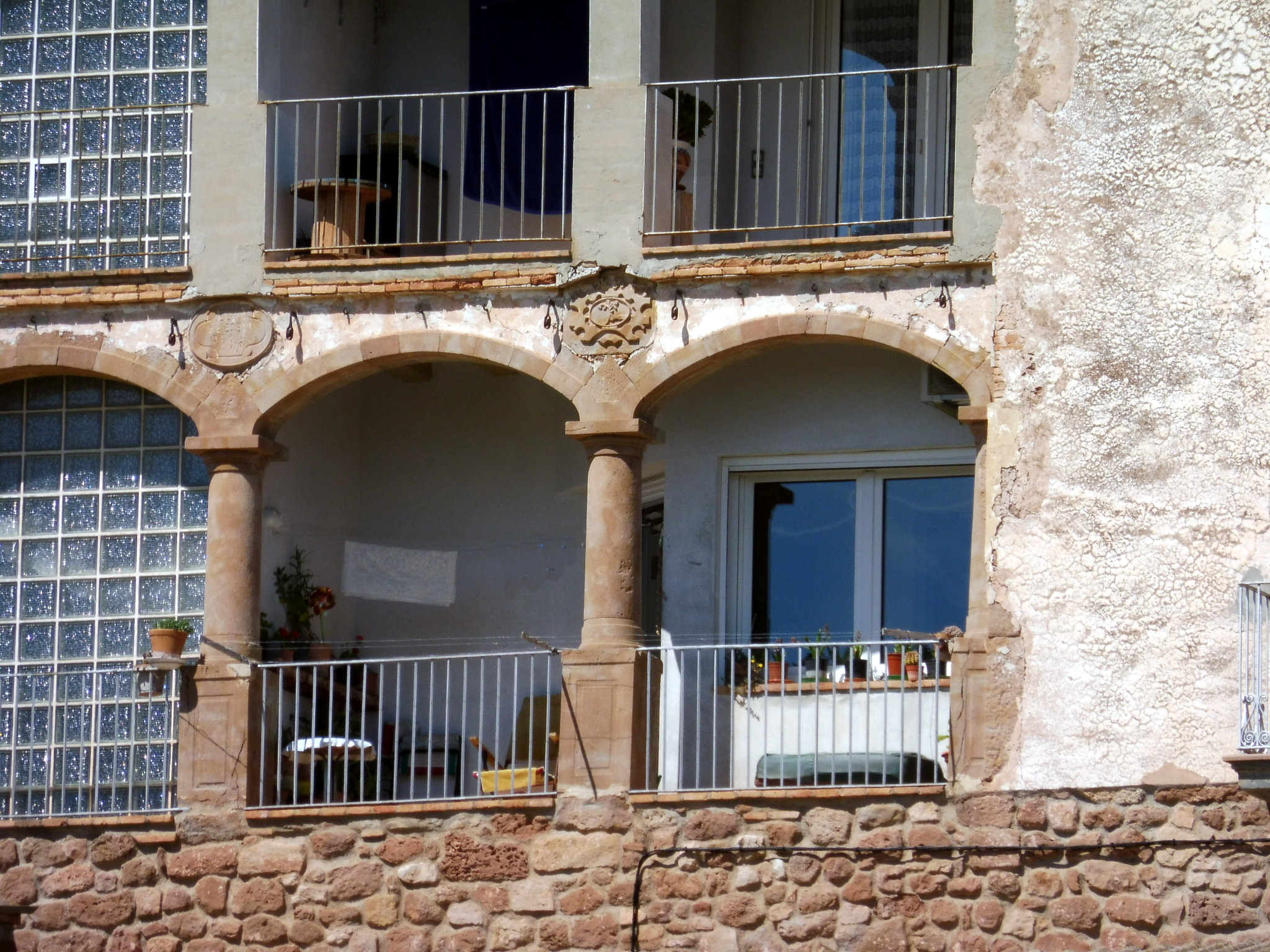 Can Massana (Rajadell): detall de la galeria